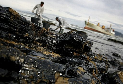 Biomarina también colaboró en la recogida de fuel en una playa de Algeciras tras haber quedado encallado un barco por el fuerte temporal.